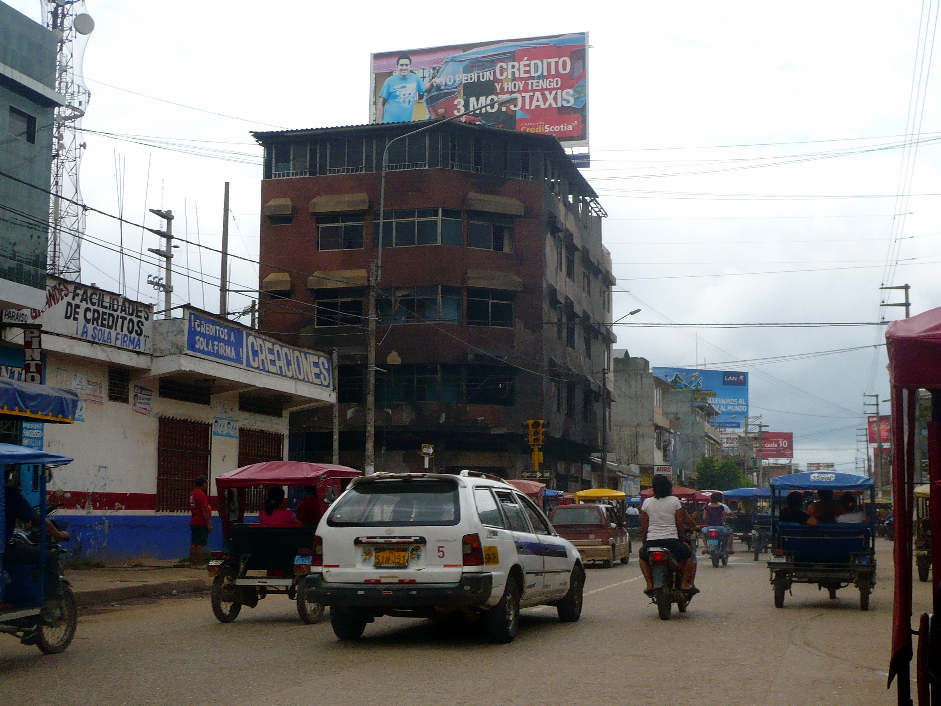 Un edificio incendiado un día después.